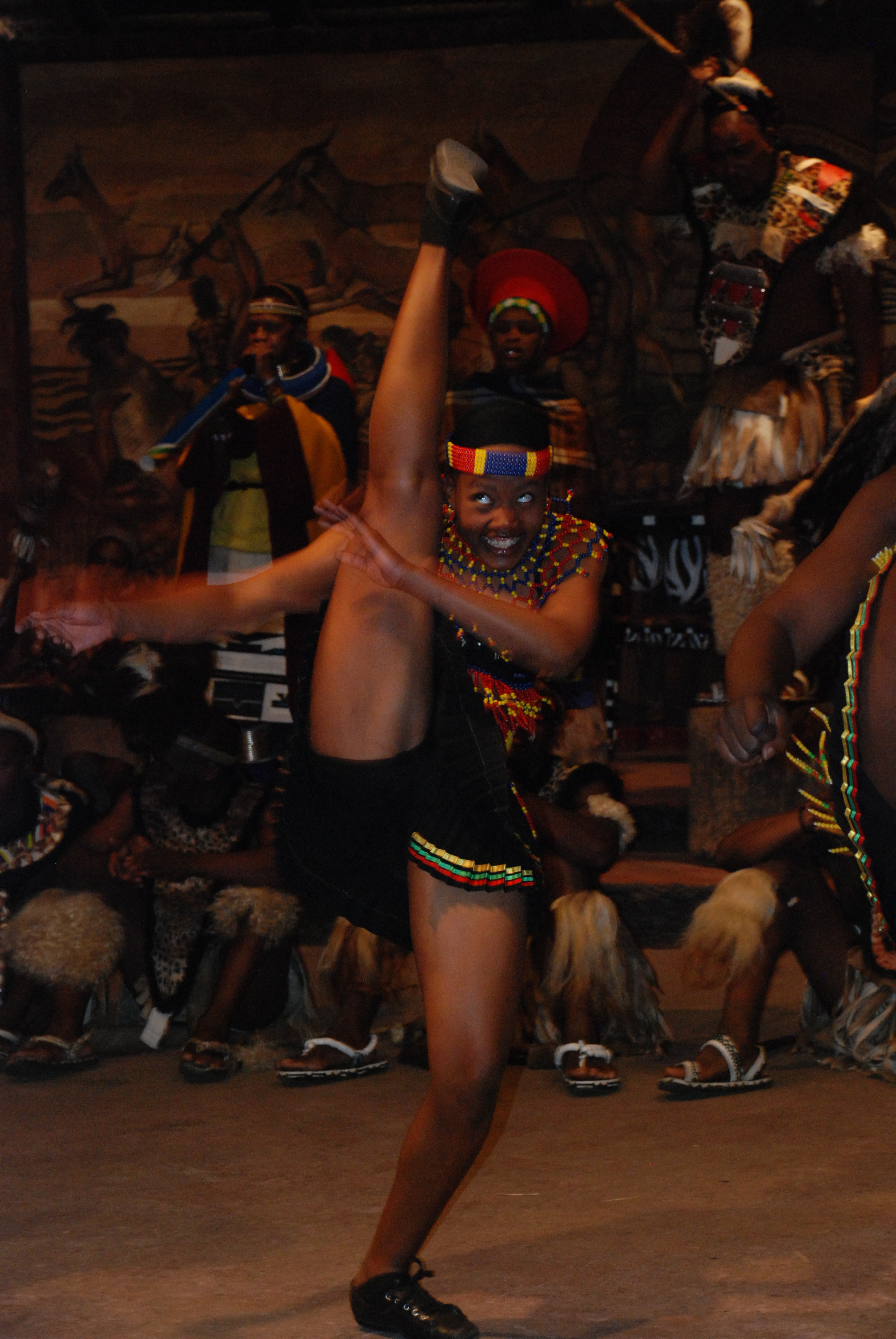 Danseuse sud africaine pendant la Coupe du monde 2010 This is an image from Cameroon